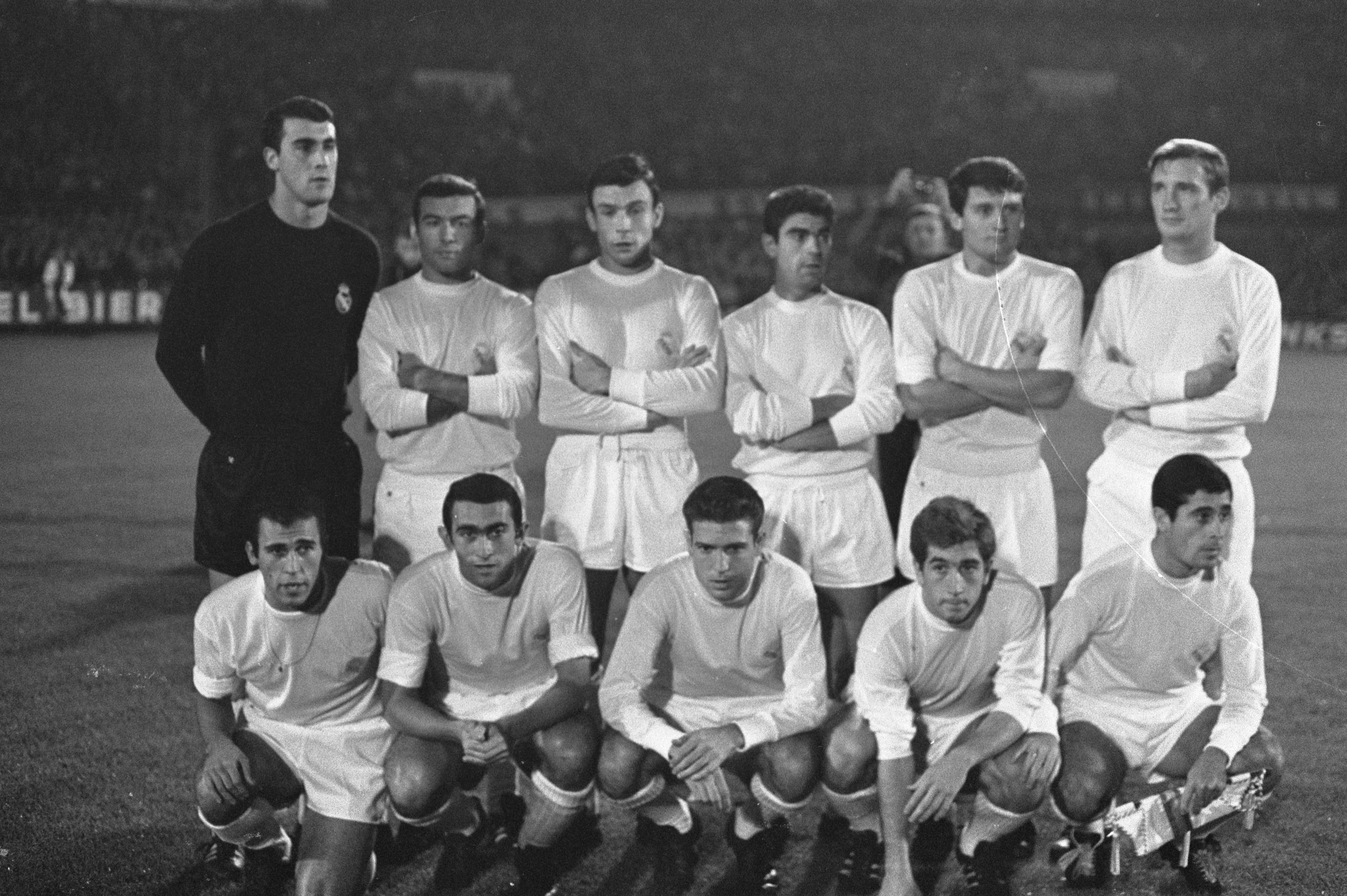 Collectie / Archief : Fotocollectie Anefo Reportage / Serie : [ onbekend ] Beschrijving : Ajax tegen Real Madrid 1-1. Elftal Real Madrid : Junquera, Calpe, De Felipe, Sanchiz, Zunzunegui, Zoco, Amancio, Pirri, Grosso, Velazques, Bueno / Datum : 20 september 1967 Trefwoorden : elftallen, sport, voetbal Instellingsnaam : Real Madrid Fotograaf : Nijs, Jac. de / Anefo Auteursrechthebbende : Nationaal Archief Materiaalsoort : Negatief (zwart/wit) Nummer archiefinventaris : bekijk toegang 2.24.01.05 Bestanddeelnummer : 920-7233